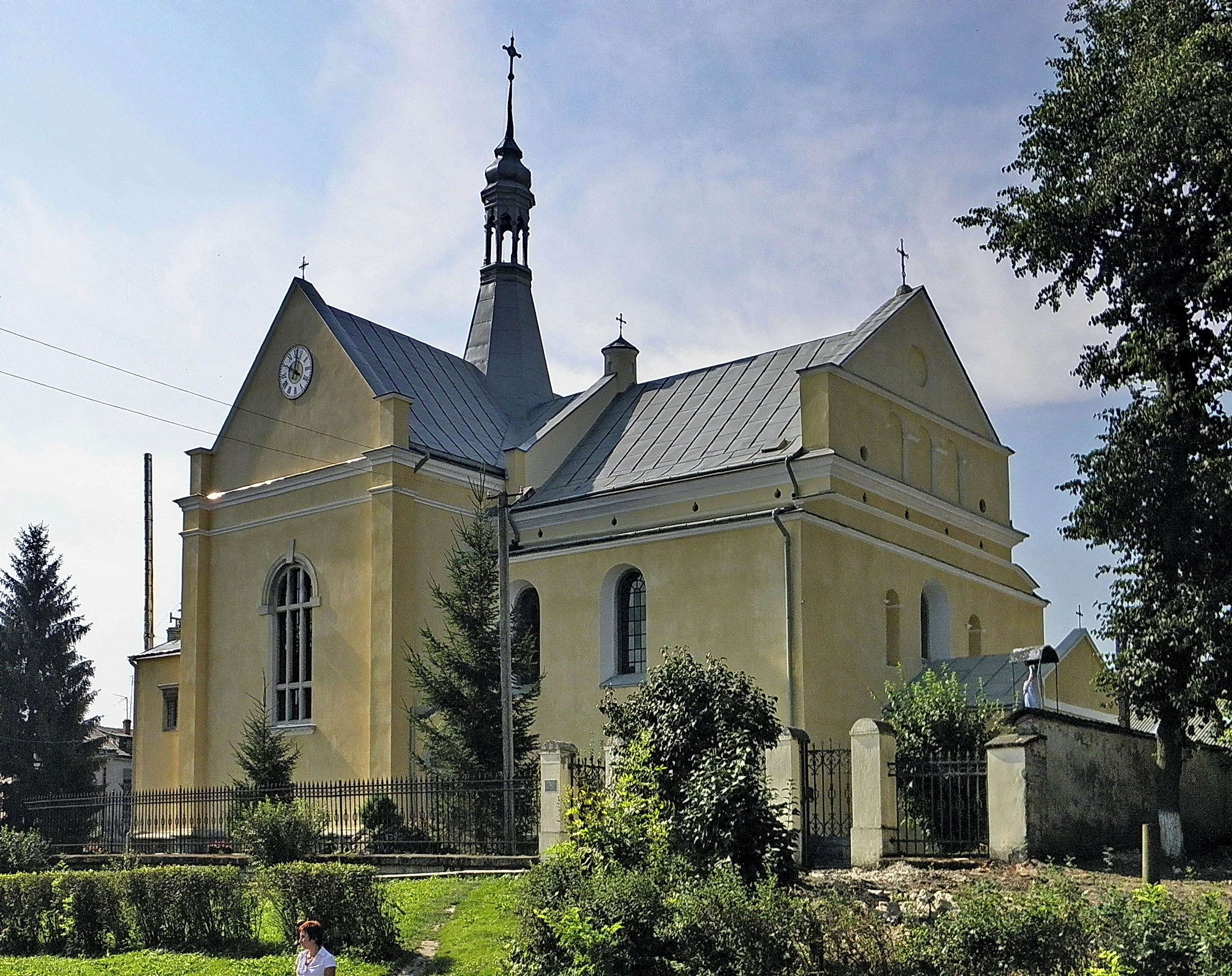 Костел Св.Миколи (мур.), Бібрка, вул.Шевченка, 5